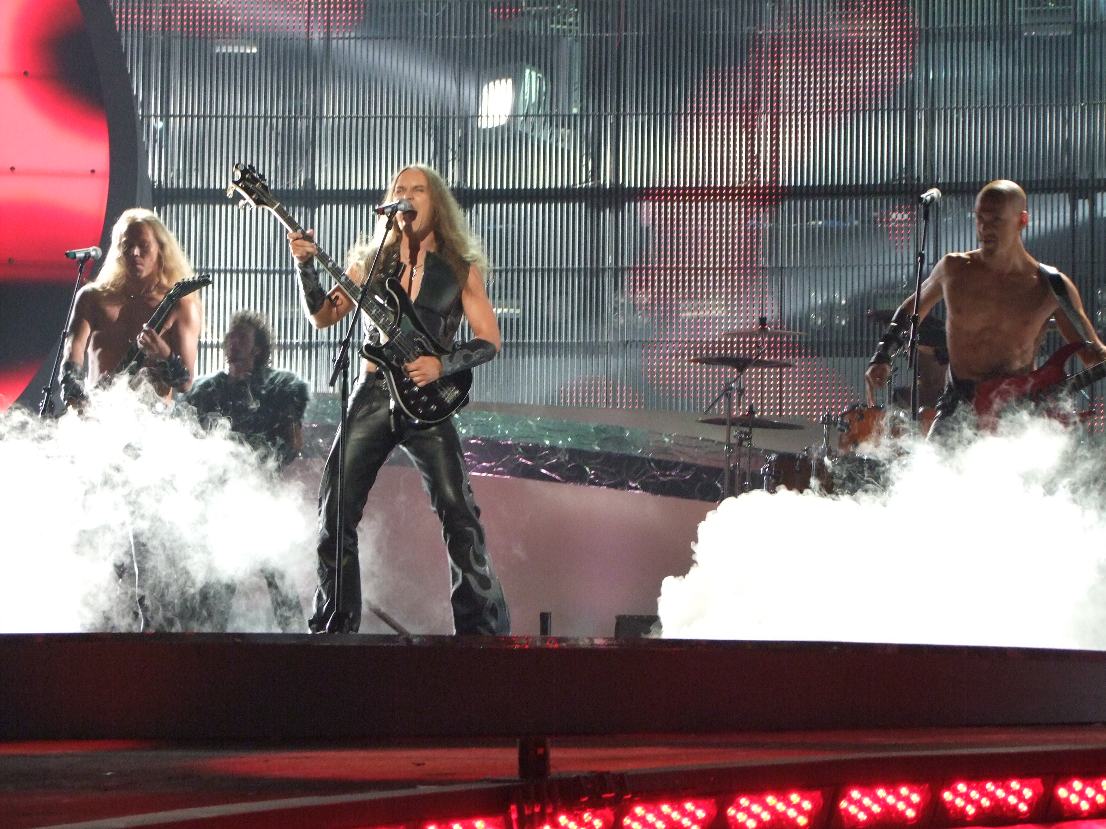 Eurovision Song Contest 2008, 1st semifinal Finland: Teräsbetoni - Missä miehet ratsastaa